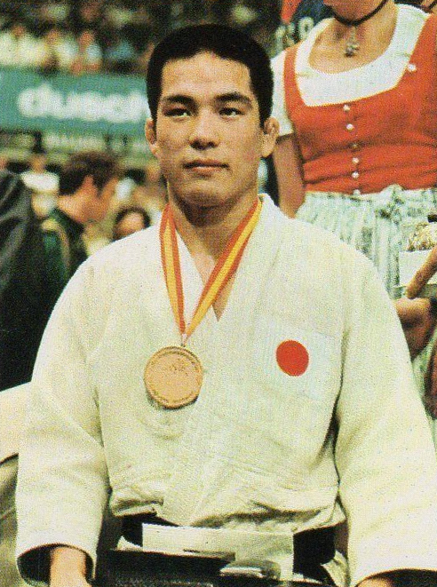 CAMPIONI DELLO SPORT ANNO 1973/74 N. 83 JUDO KAWAGUCHI